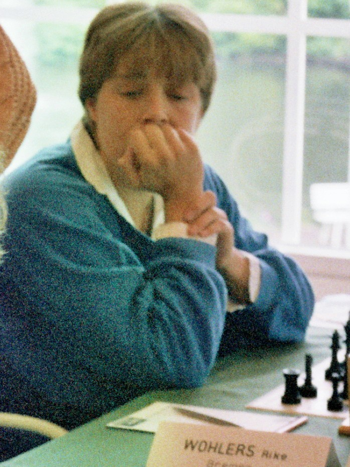 Rike Wohlers, 29. Deutsche Damenmeisterschaft 1987 vom 10. bis 20. Juni 1987 in Bad Lauterberg.